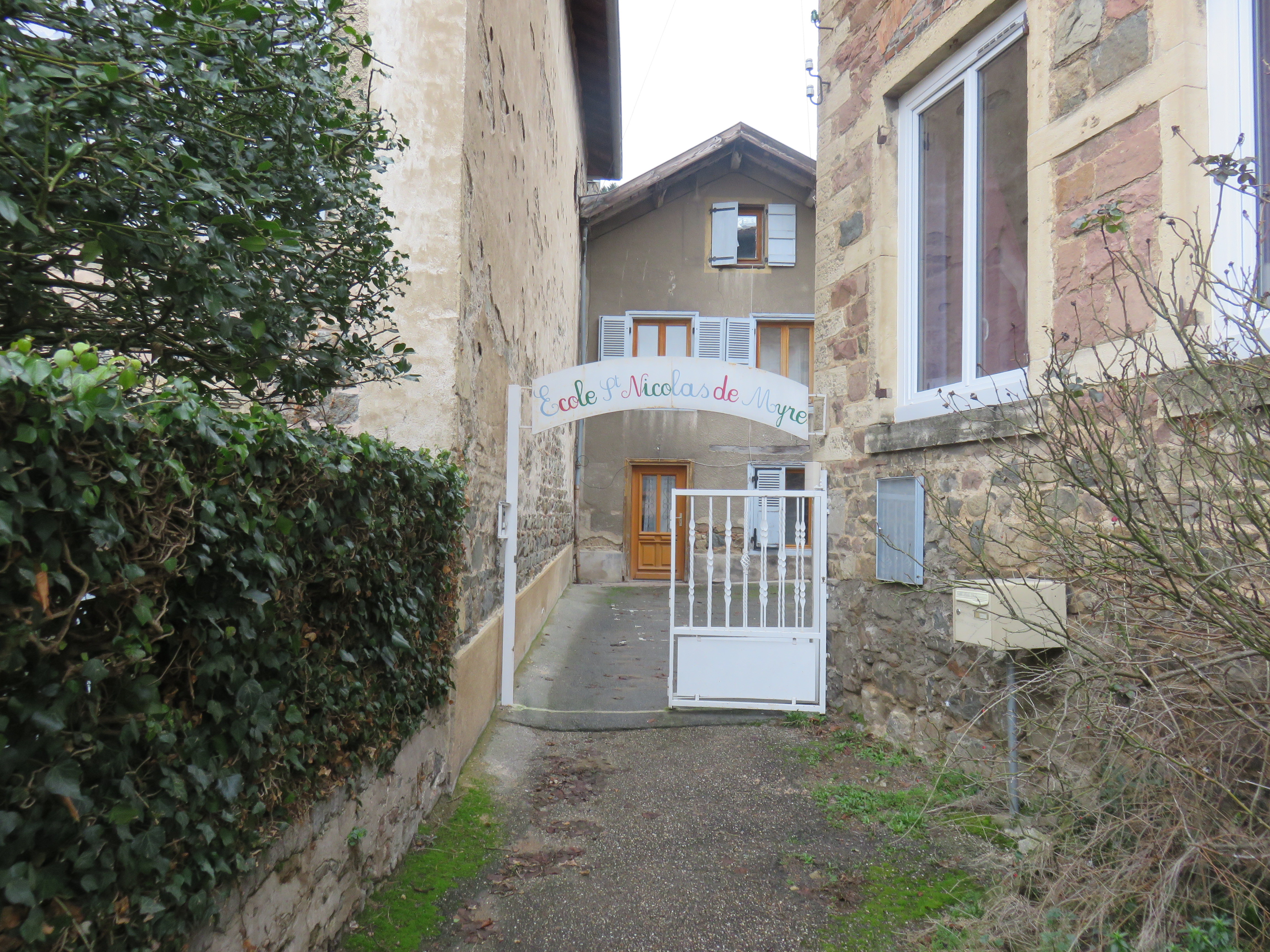 Allée menant à l'école privée Saint-Nicolas de Myre, à Grandris (Rhône, France).